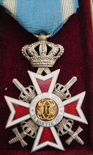 oRDE VAN DE kROON VAN rOEMENIE, MET ZWAARDEN NA 1932.